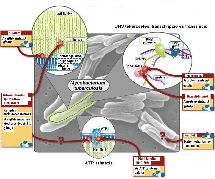 Ez a kép a Tuberculosis-drugs-and-actions képnek egy új magyar változata amelyben az ábra leírására a szerző az irodalomban jelenleg használt szavakra/kifejezésekre váltotta át főleg a Google kereső alapján